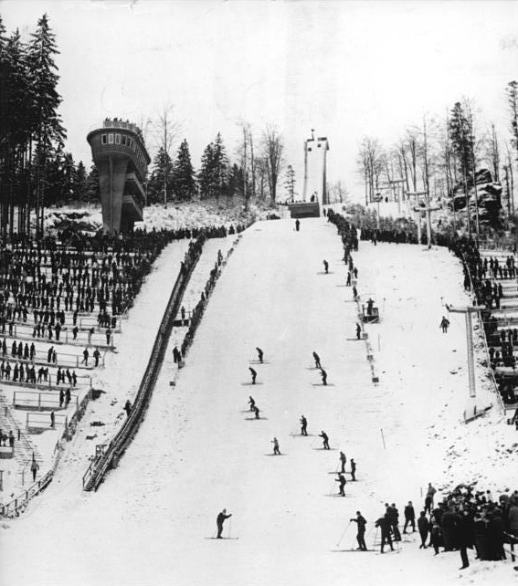 Zentralbild Kohls 15.1.1962 Peter Lesser siegte Das zweite Ausscheidungsspringen für die Weltmeisterschaften in Zakopane gewann am 14.1.1962 auf der Großen Aschbergschanze in Klingenthal der talentierte Nachwuchsspringer Peter Lesser. Mit Sprüngen von 96 und 89 Metern. Er verwies den Weltmeister und Olympiasieger Helmut Recknagel auf den zweiten Platz. UBz: Blick auf die Große Aschbergschanze in Klingenthal. Vorlage